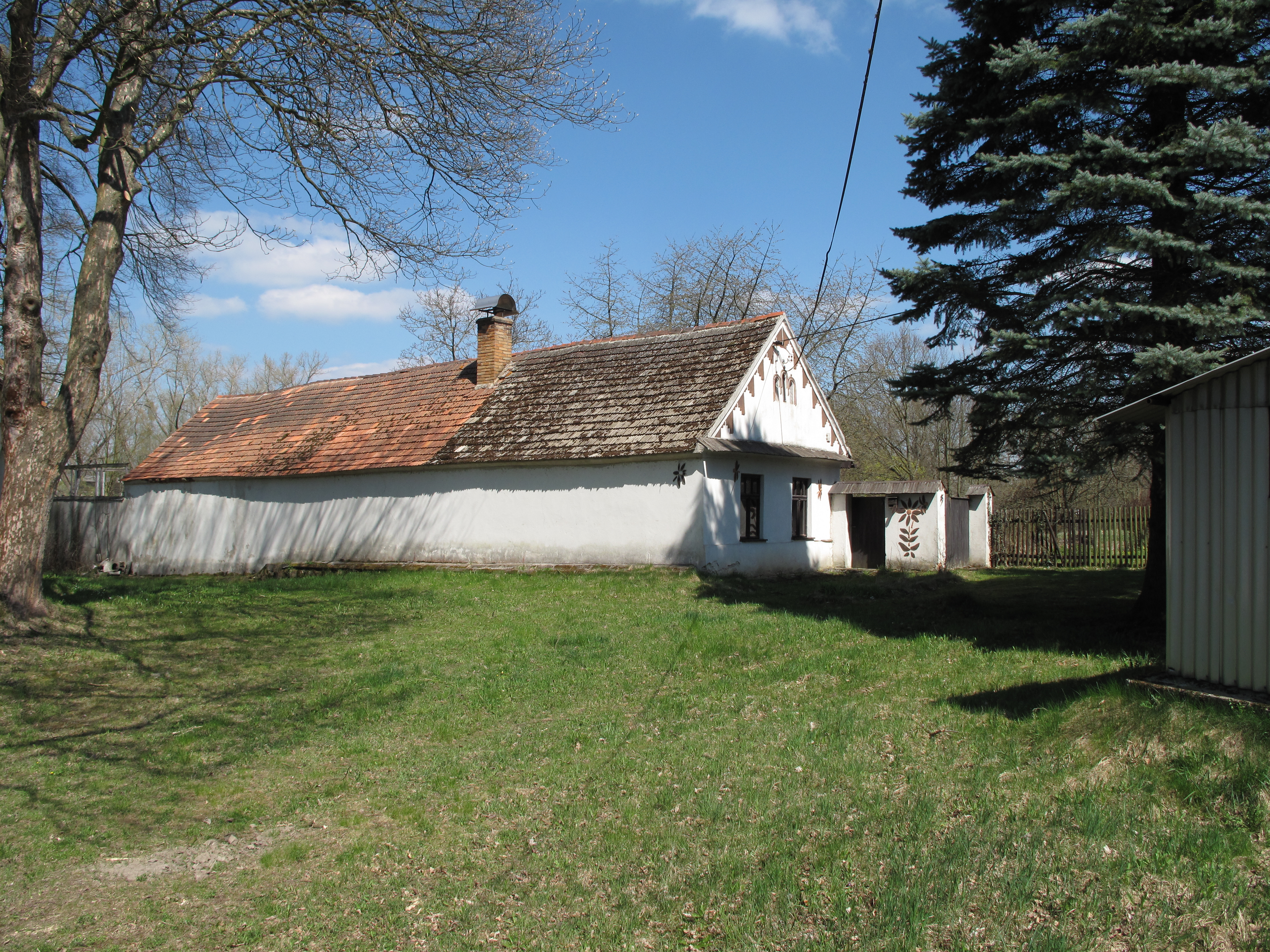 Chalupa v Hvozdně. Okres České Budějovice, Česká republika.